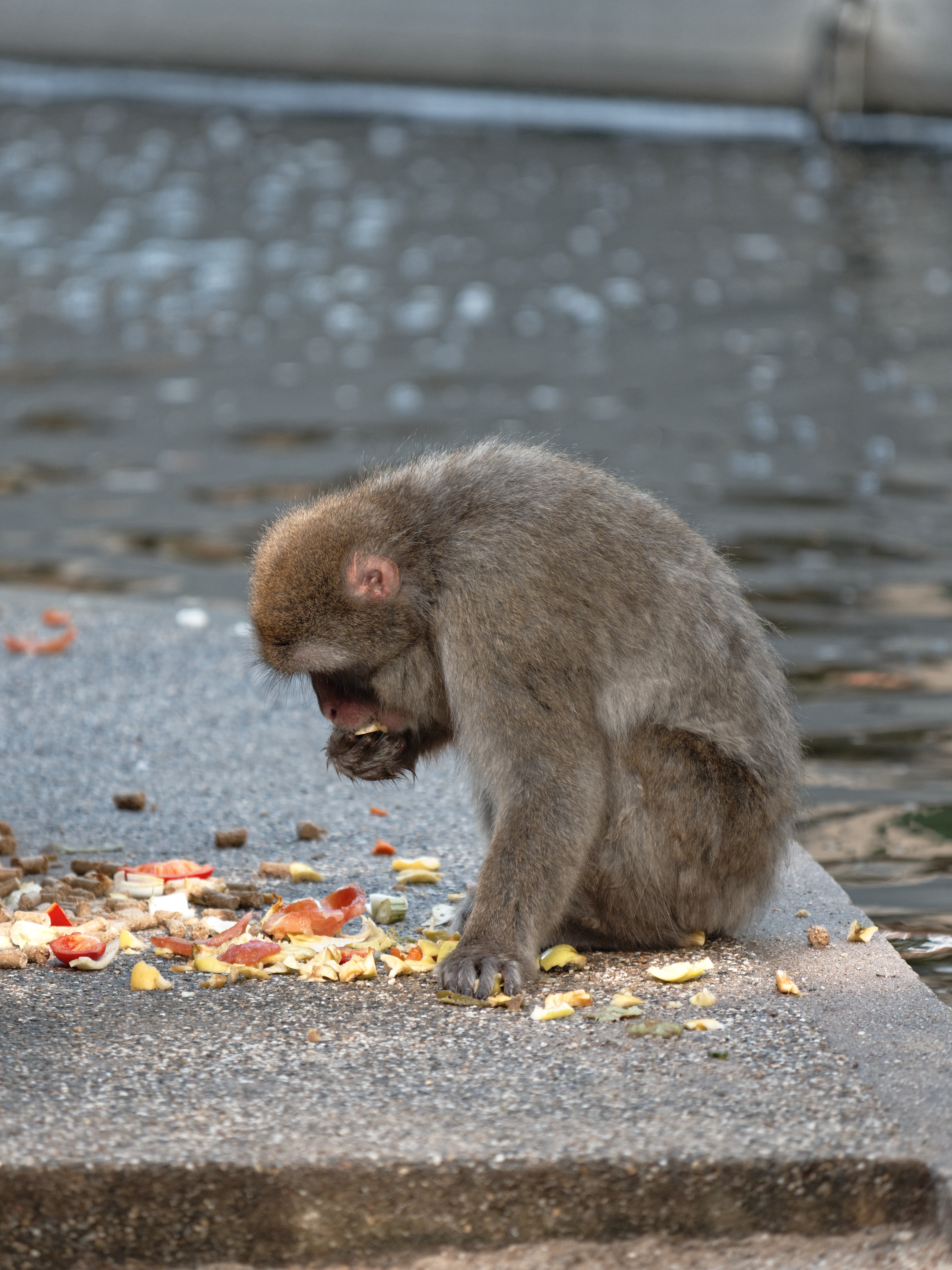 Artis